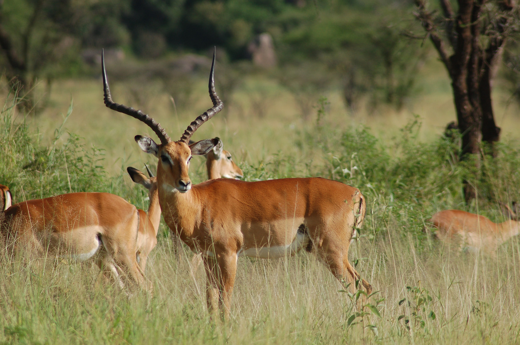 Impala in Serengeti, Tanzania